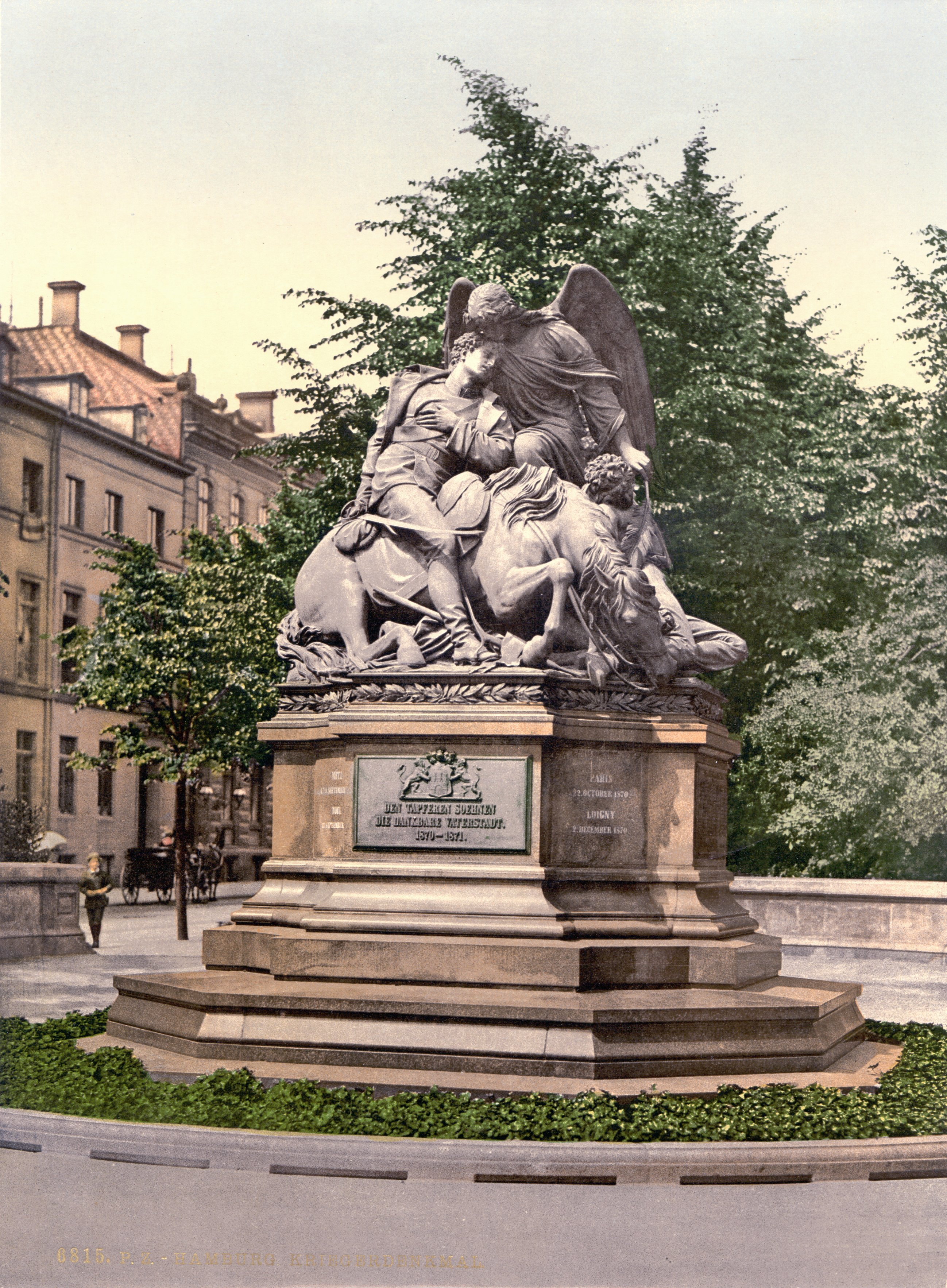 Kriegerdenkmal 1870/71 (Hamburg-Rotherbaum). Das Kriegerdenkmal wurde von Johannes Schilling geschaffen und 1877 eingeweiht. Es soll an die Gefallenen des Deutsch-Französischen Kriegs von 1870/71 erinnern. Bis 1926 stand die Skulptur an der Esplanade am Stephansplatz, danach wurde sie an die Fontenay in Rotherbaum versetzt.